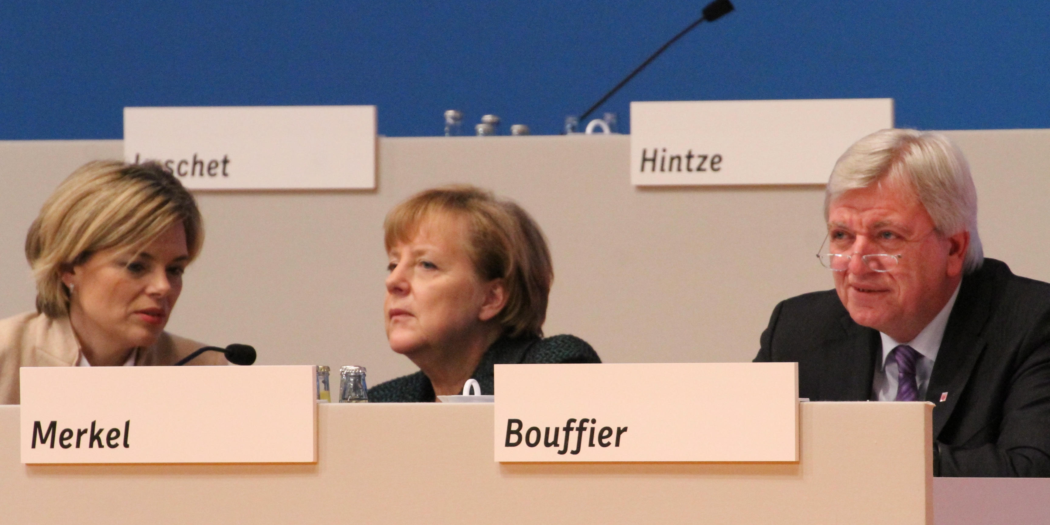 CDU Bundesparteitag Dezember 2014 in Köln